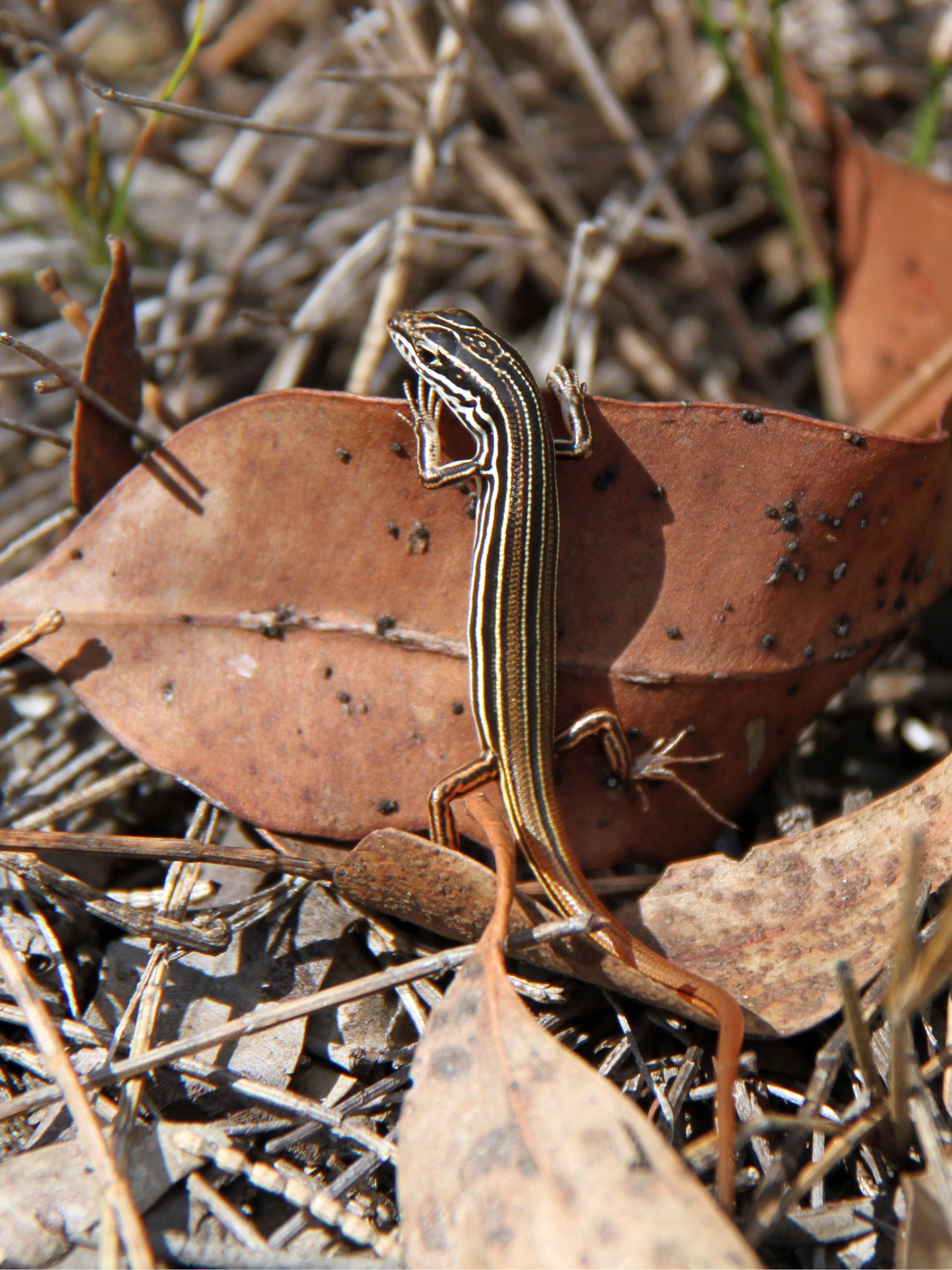 Copper-tailed Skink, Ctenotus taeniolatus